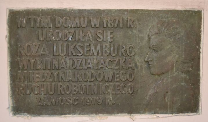 Gedenktafel am Elternhaus von Rosa Luxemburg in Zamość (Polen)